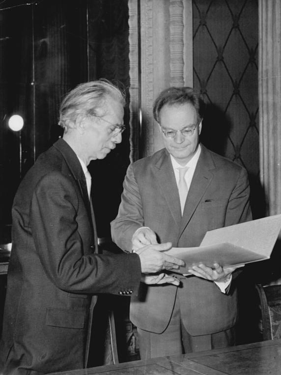 Otto Nagel, Ehrenmitglied der AdK der UdSSR Zentralbild Kohls 14.10.1960 Prof. Otto Nagel erhielt Diplom über Ehrenmitgliedschaft der Akademie der Künste der UdSSR Der Ausserordentliche und Bevollmächtigte Botschafter der UdSSR in der DDR, M.G.Perwuchin, überreichte am 14.10.1960 dem Präsidenten der Akademie der Künste der DDR, Prof. Otto Nagel, das Diplom über die Ehrenmitgliedschaft der Akademie der Künste der UdSSR. UBz: Beim Überreichen der Urkunde, rechts M.G. Perwuchin. Abgebildete Personen: Nagel, Otto Prof.: Maler, Präsident der Akademie der Künste (AdK), Nationalpreisträger, Vaterländischer Verdienstorden (VVO) in Gold, DDR (GND 118586300)